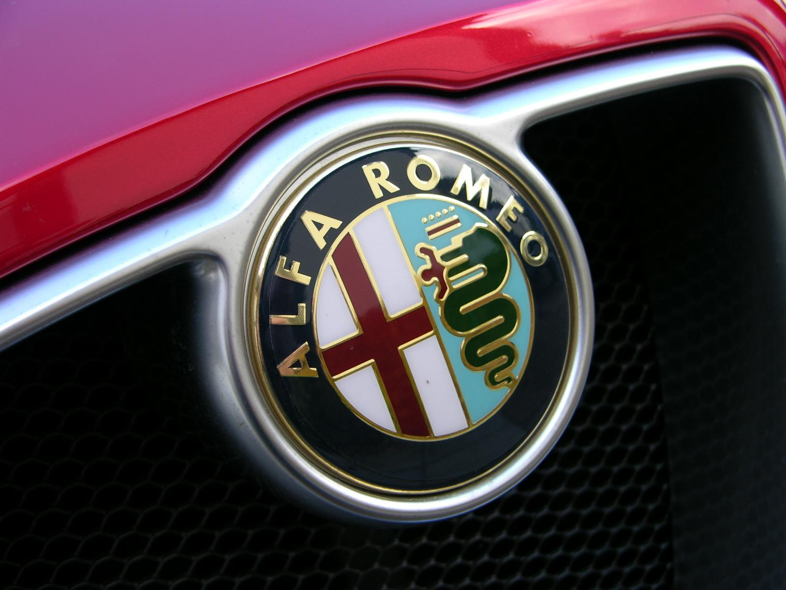 Alfa Romeo 8c Spider